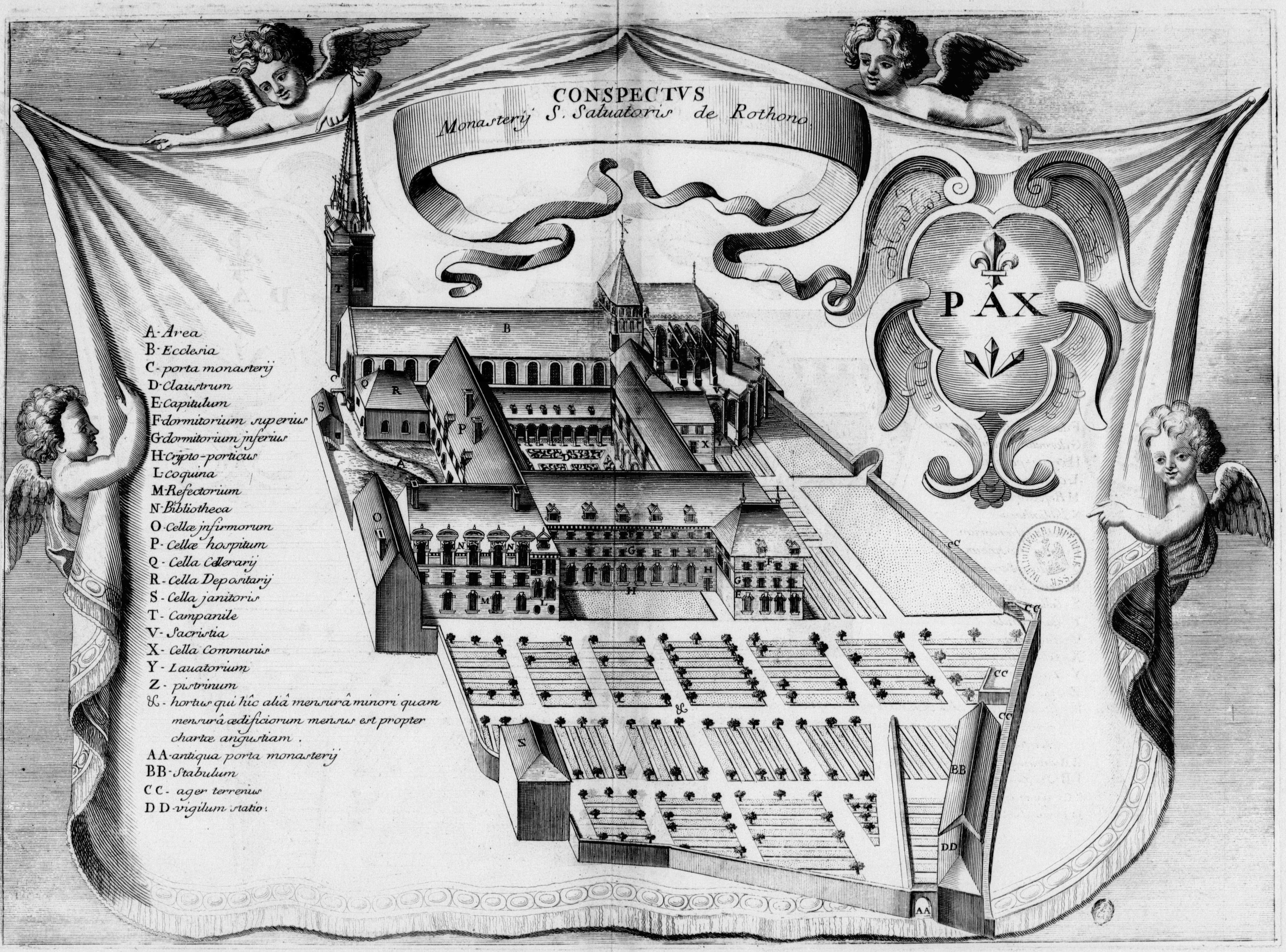 Planche gravée du 17ème siècle représentant l'abbaye Saint-Sauveur de Redon, dans le livre Monasticon Gallicanum.